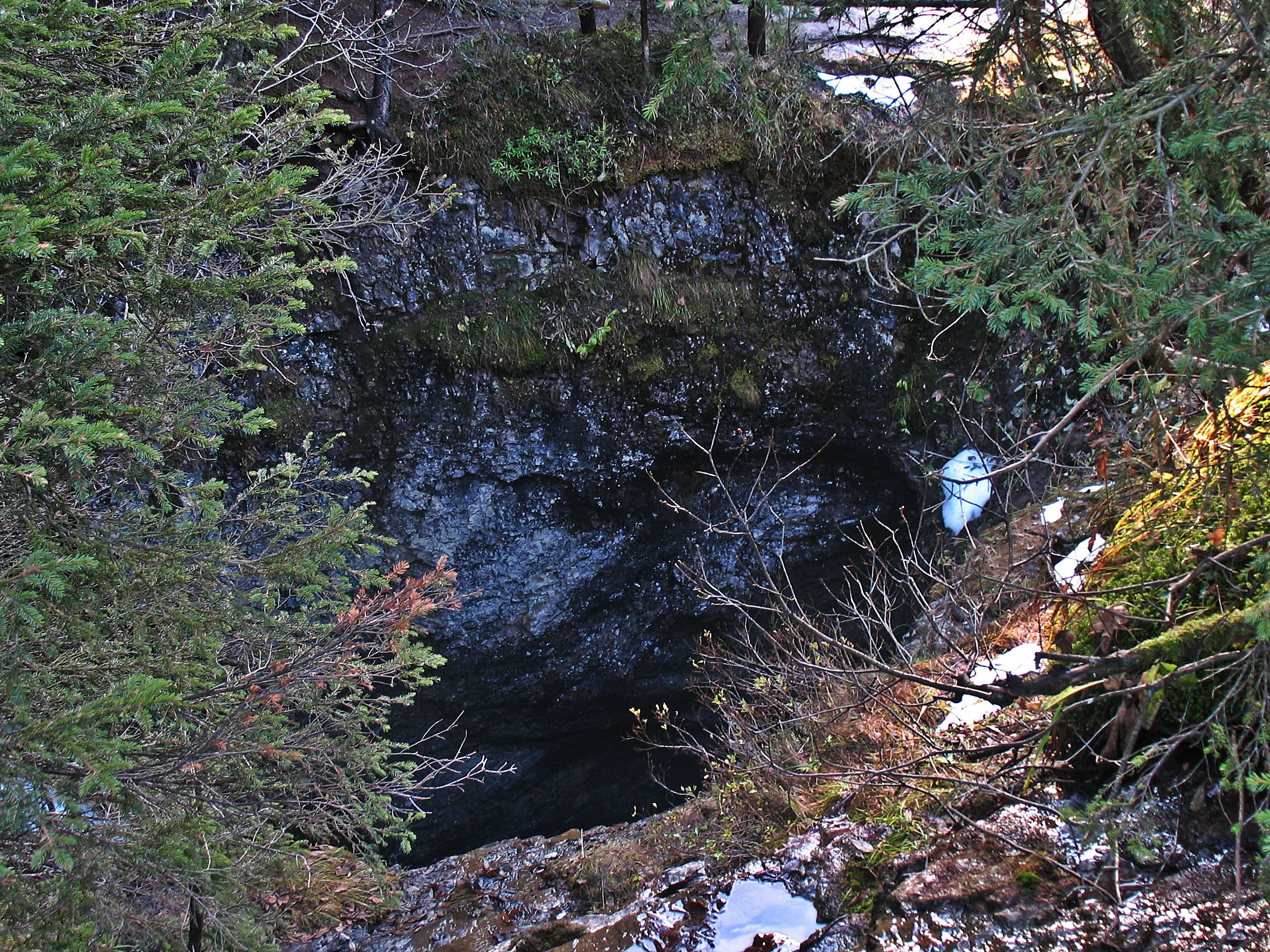 Bergseitiger Blick in den Eingangsschacht des Hölloch.